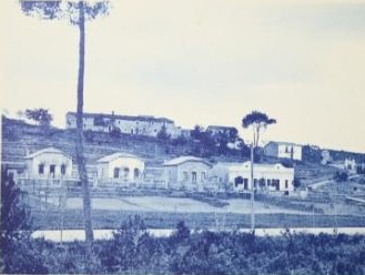 Postal sin circular. Estado de conservación bueno. Ref. Ptd2_109